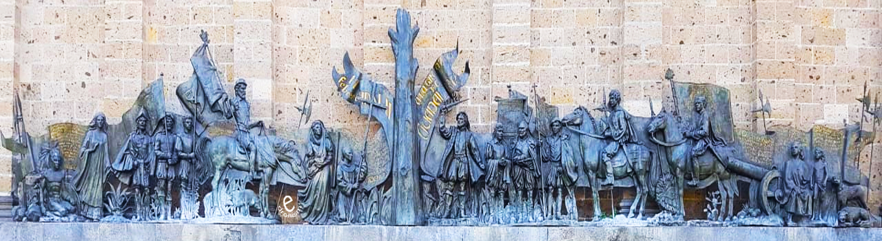 Bronce relativo a la fundación de Gudalajara. Relieve de Rafael Zamarripa. Se observa a Cristobal de Oñate acompañado de conquistadores, indios y frailes